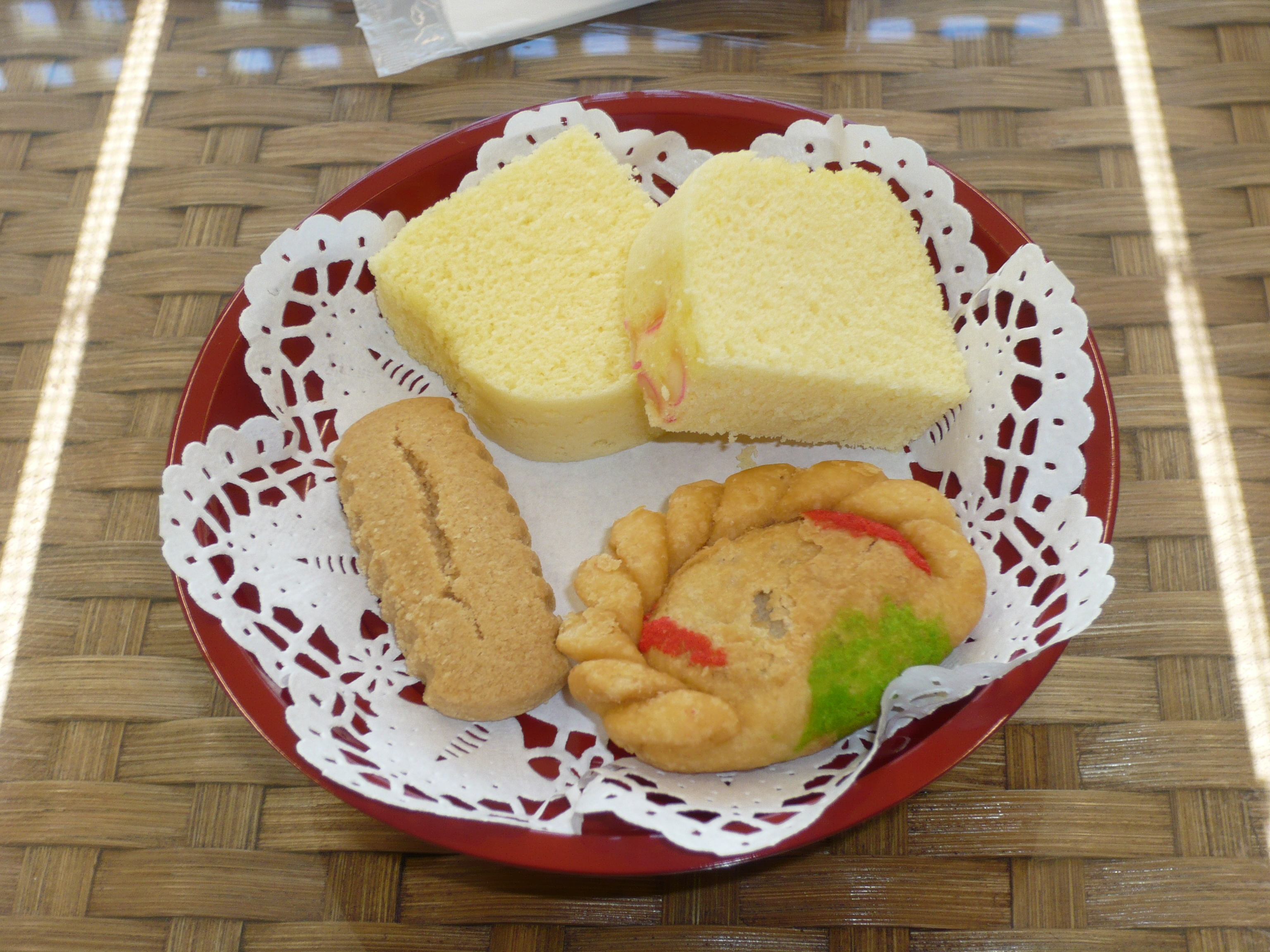 琉球菓子の盛り合わせ。上がちいるんこう（鶏卵糕）、左下がちんすこう、右下が闘鶏餃（たうちいちゃう）。